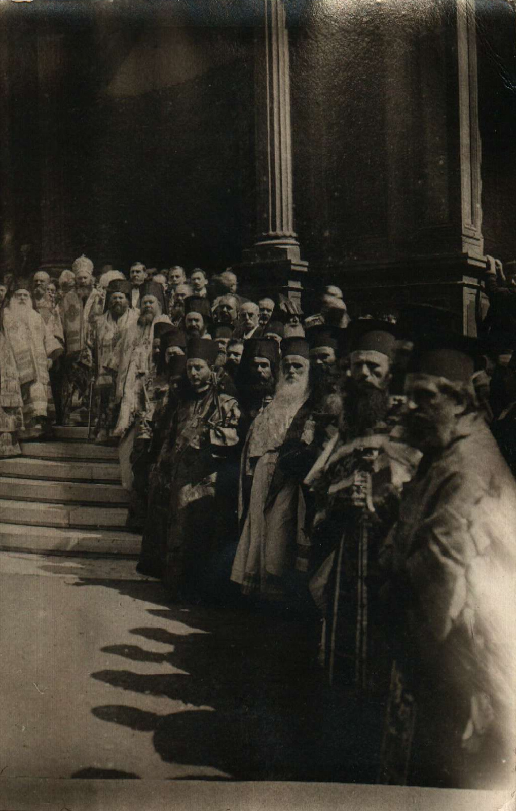 Снимка на иконом Николай Маринов Шкутов, управляващ Костурската епархия - третия от дясно на ляво, заедно с други духовни лица на юбилея на Екзарх Йосиф, Истанбул.